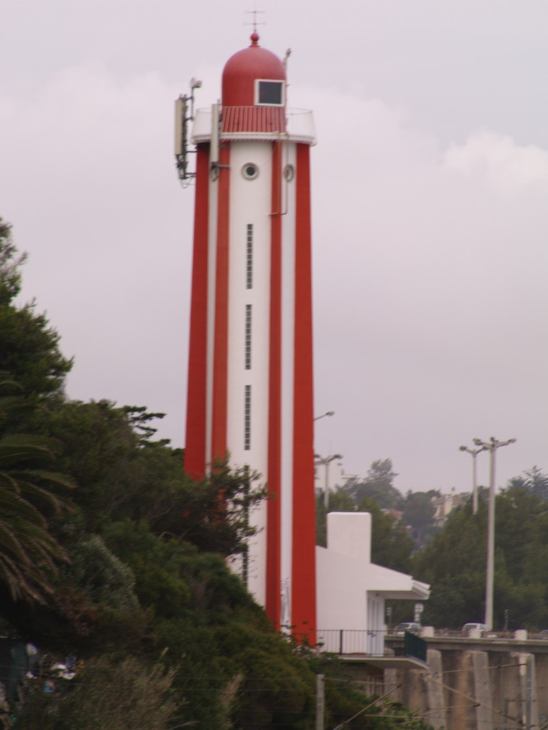 Farol da Gibalta, Caxias, Oeiras, Lisboa, Portugal